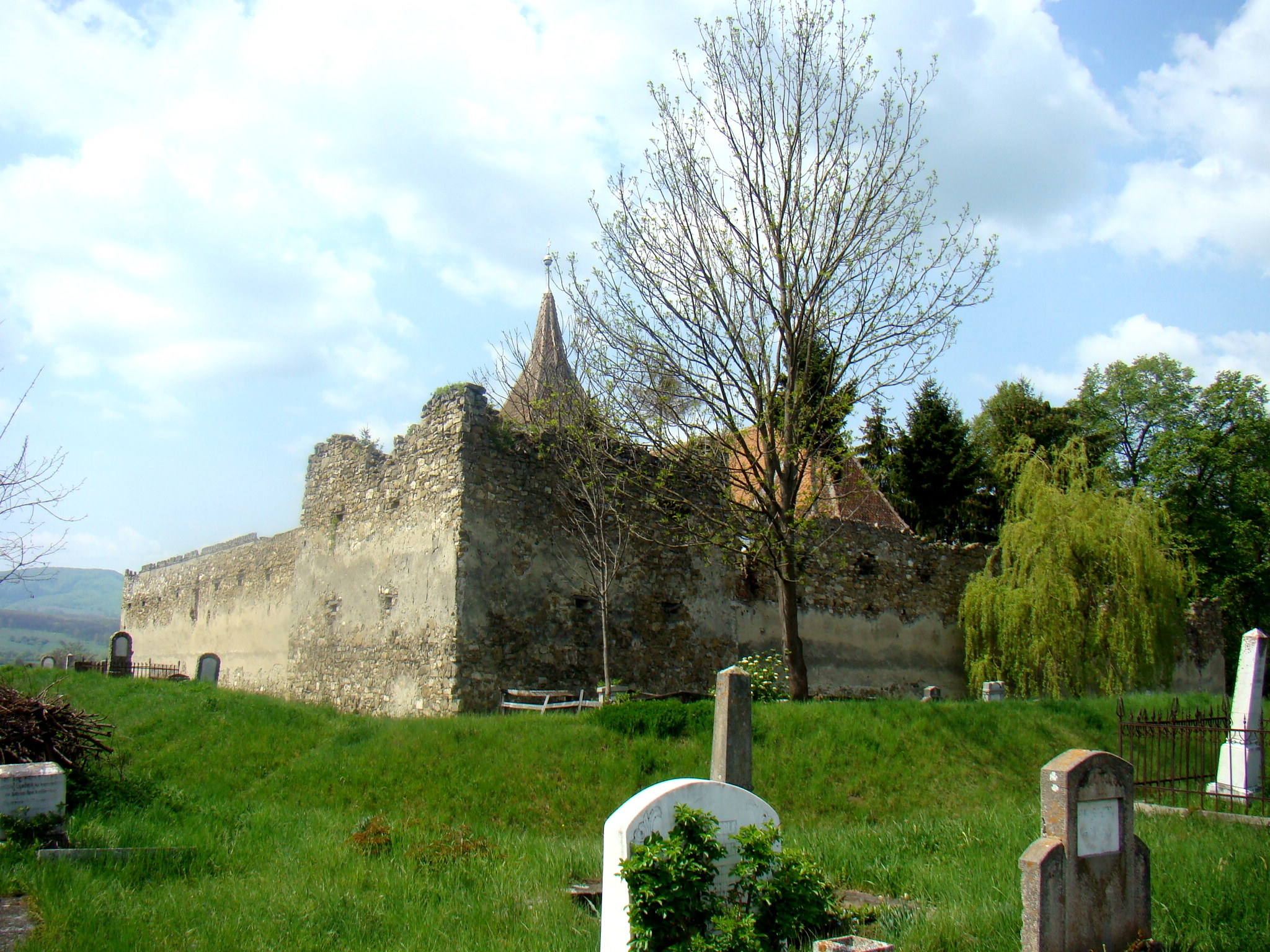 Aita Mare Vartemplom